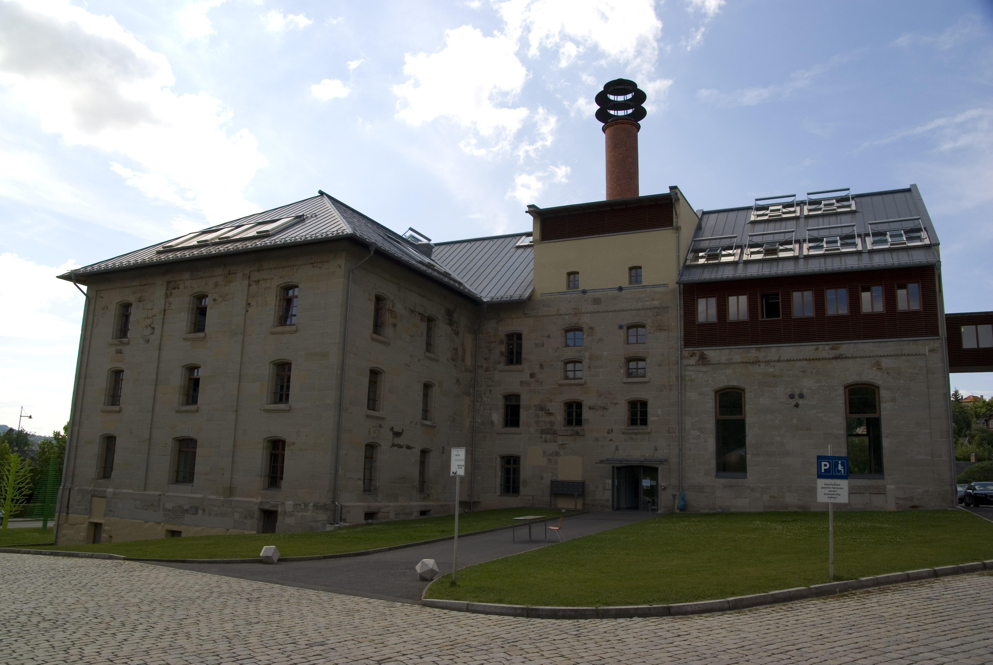 Hofbräuhaus in Coburg, Bayern. Rückseite